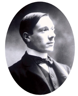 Fotografía del cirujano Enrique Finochietto en 1905